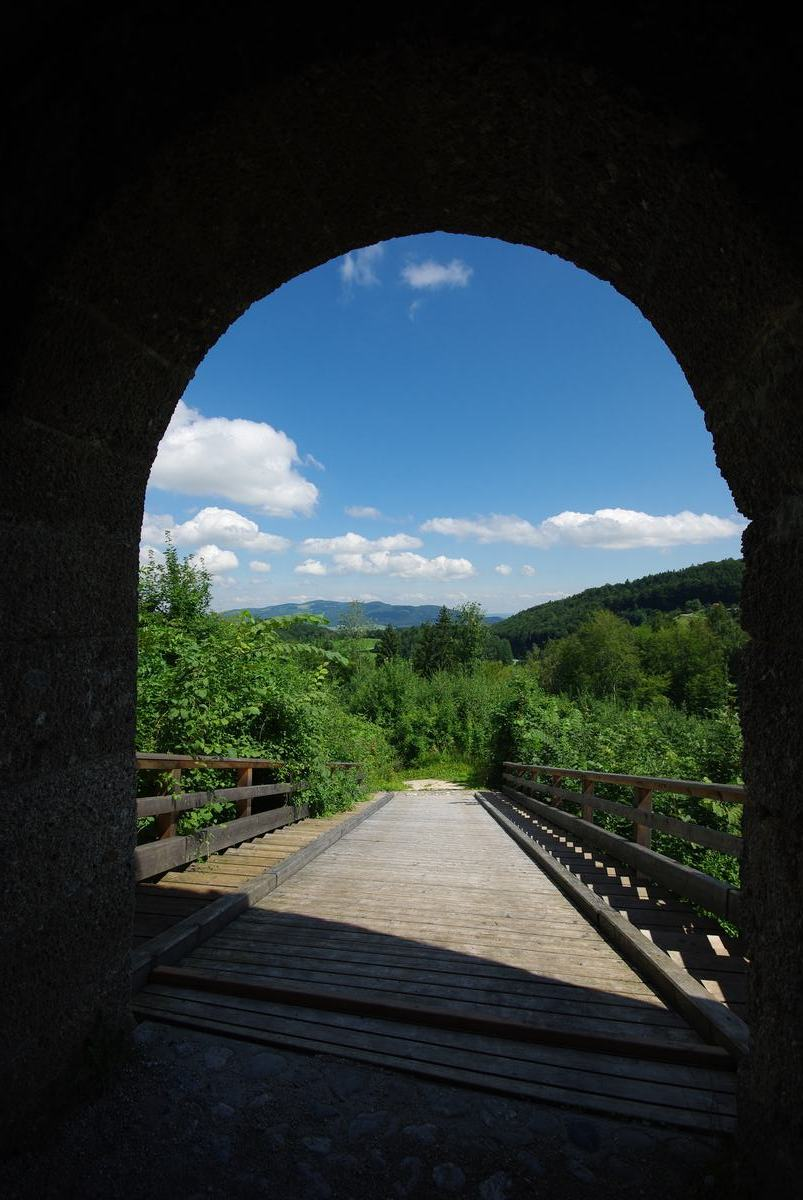 Plainburg, Blick aus dem Torhaus Richtung Salzburg (im Osten)